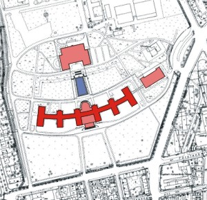 IG Farben building plan